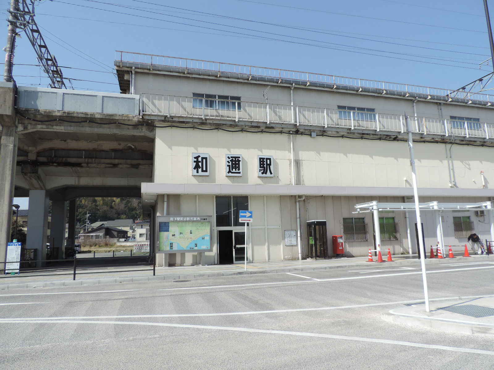 和邇駅東口